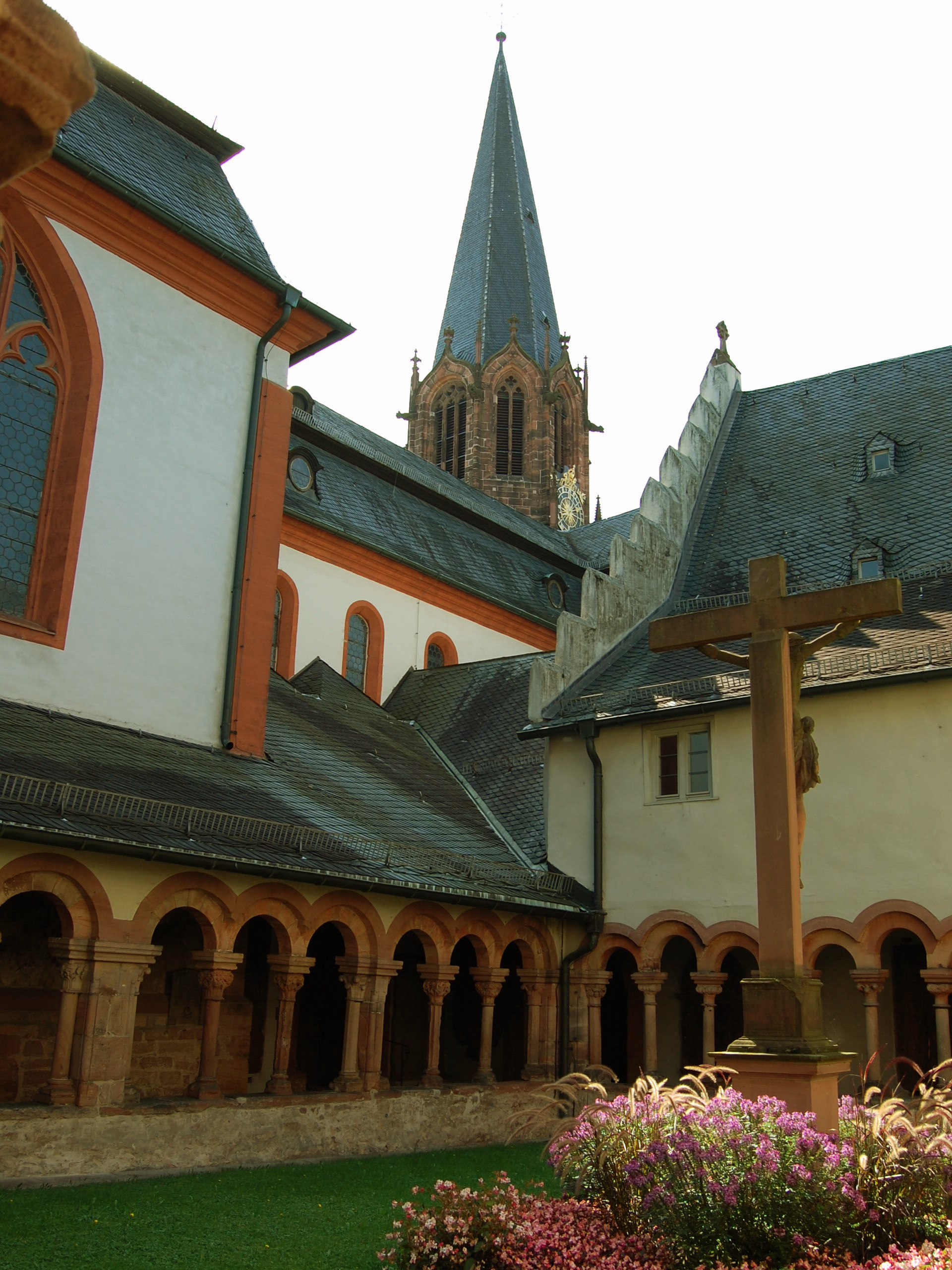 Dziecziniec wewnętrzny bazyliki